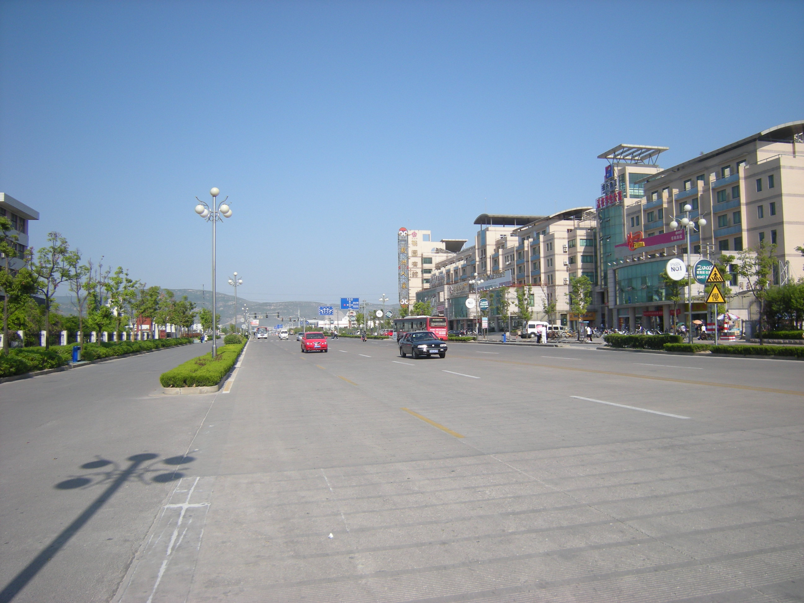 连云港街景，2009年5月6日拍摄于苍梧路